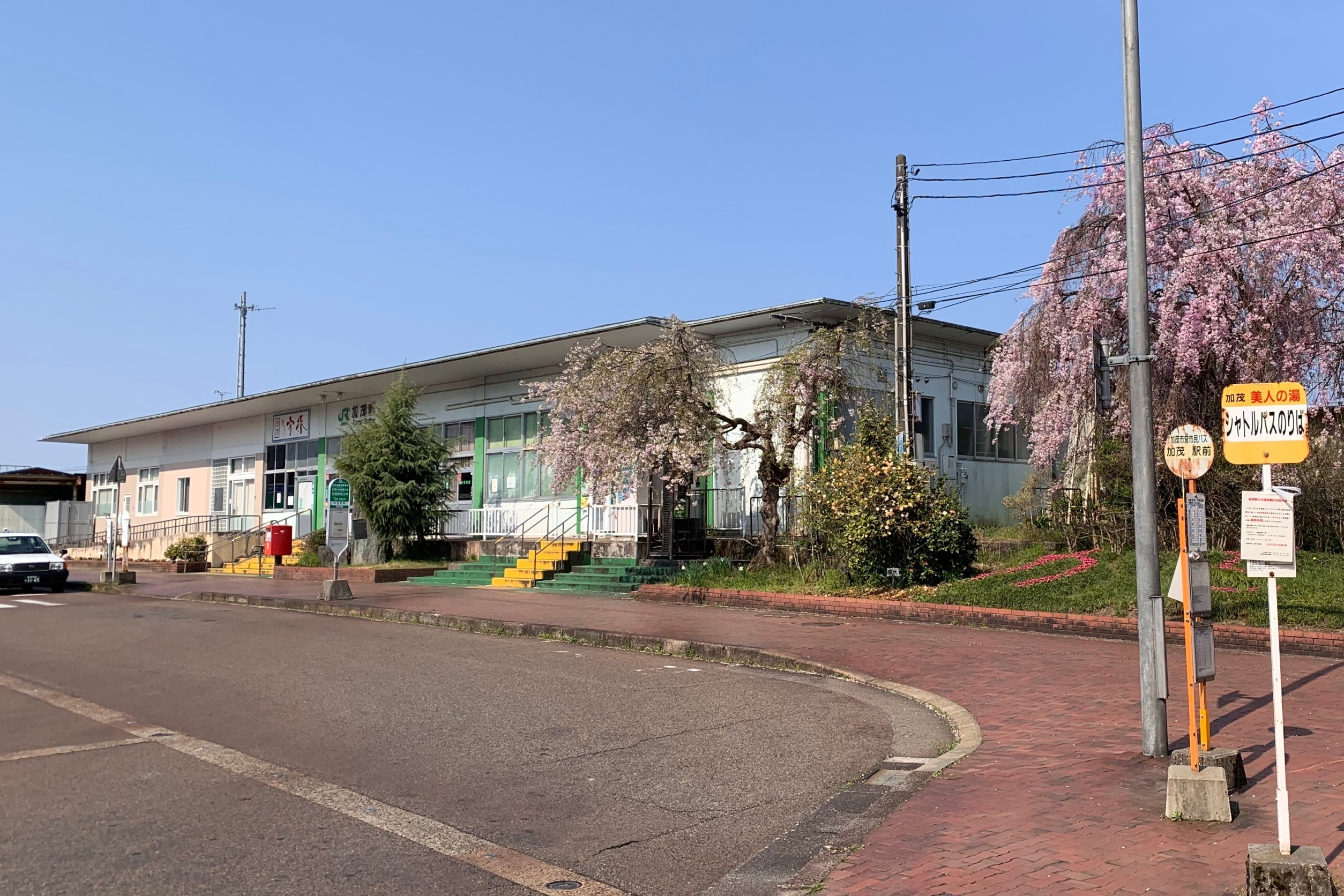 加茂駅の東口駅舎（2020年4月）